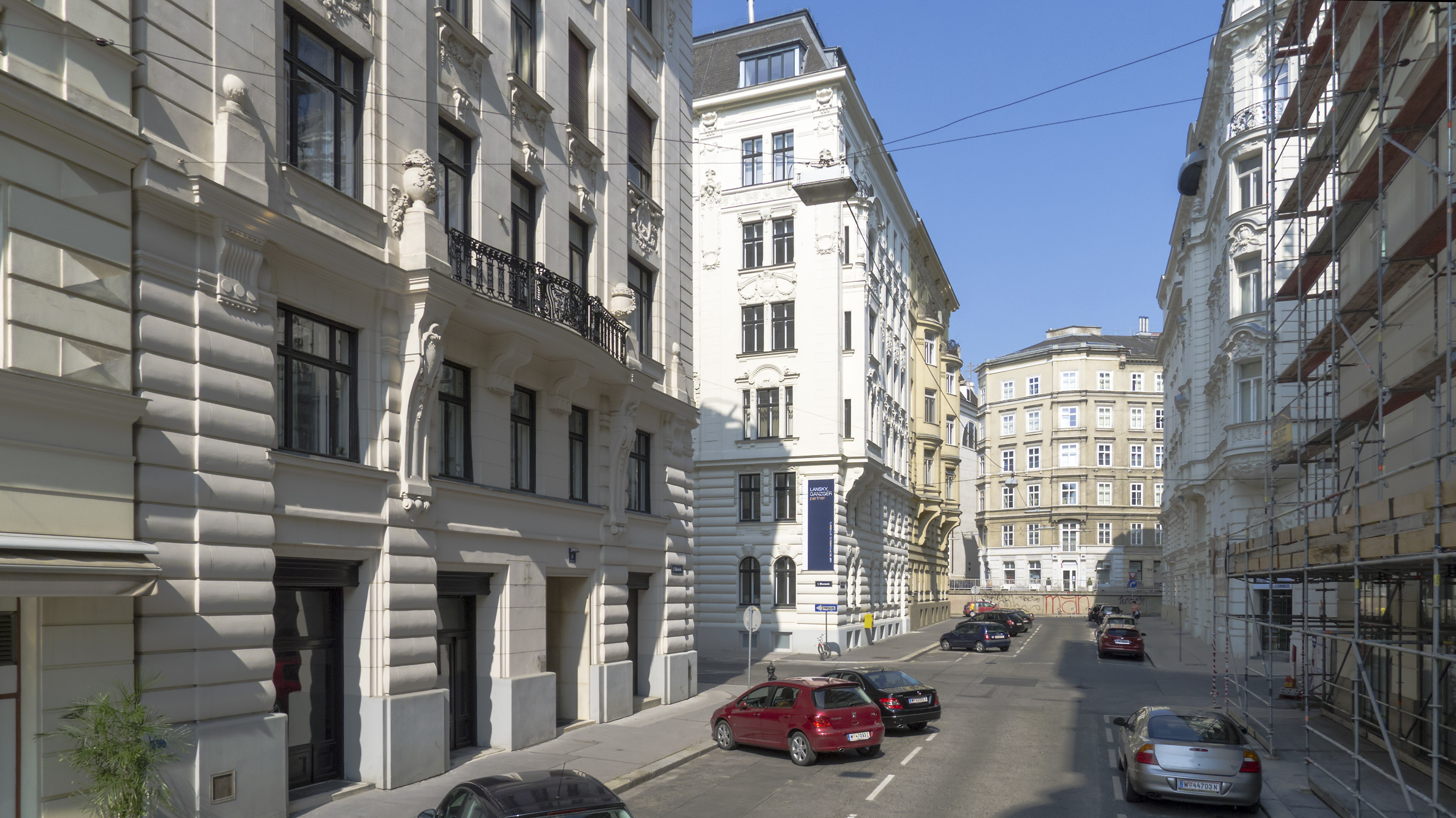 Falkestraße in Wien 1 bei Nr. 7 Richtung Nordwesten